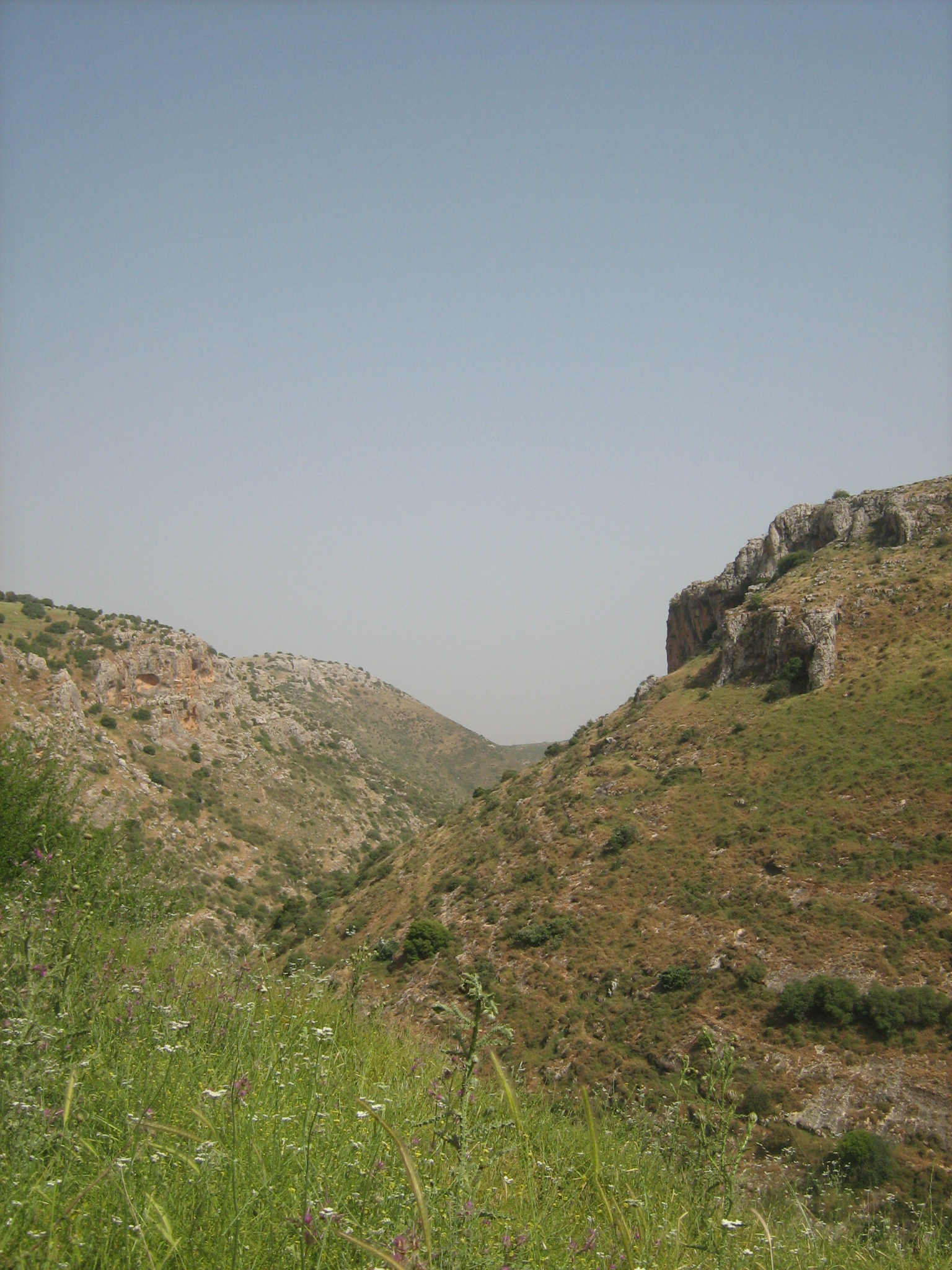 ערוץ נחל אביב